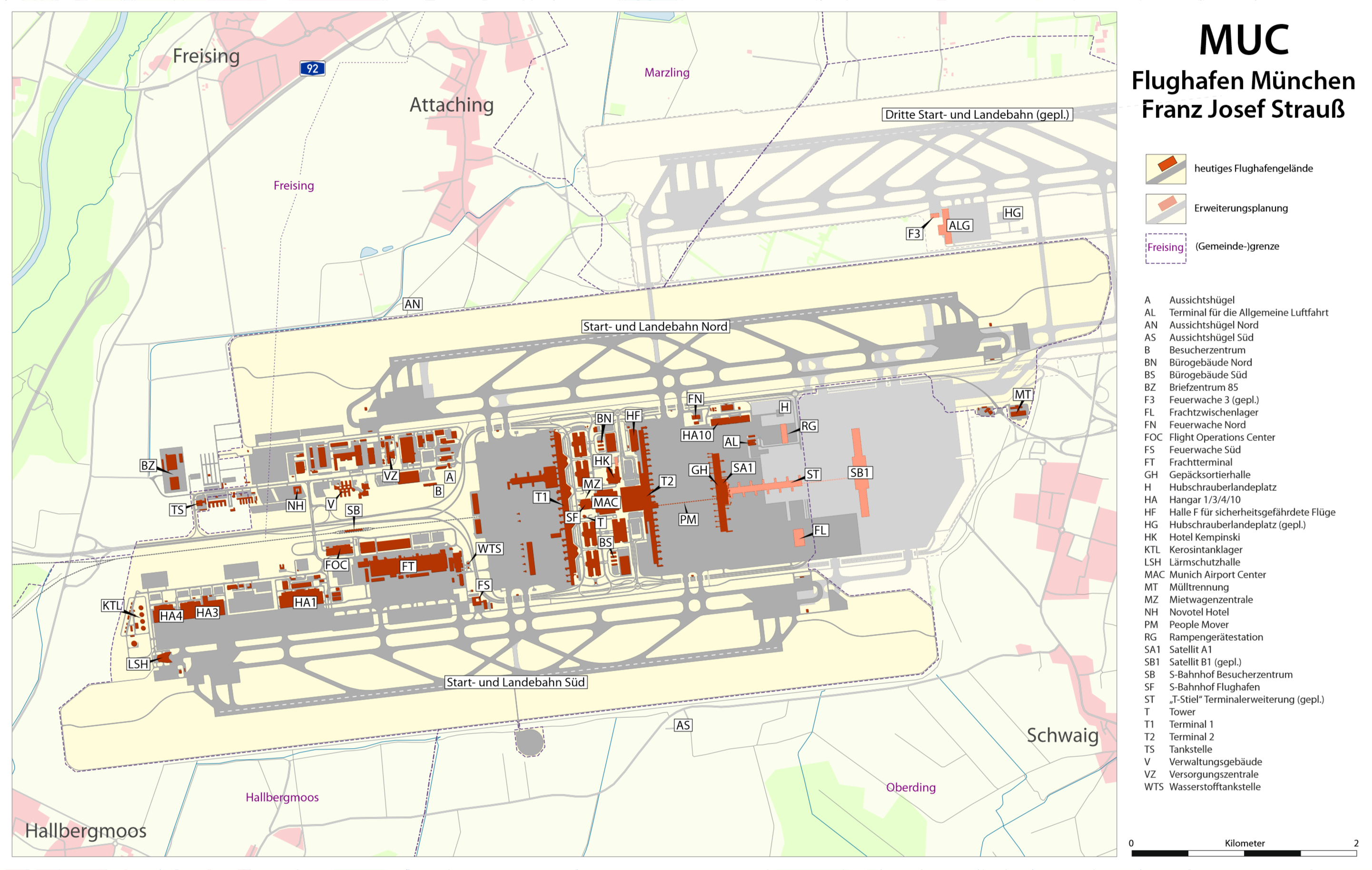 Karte vom Flughafen München inkl. geplanter Erweiterungen